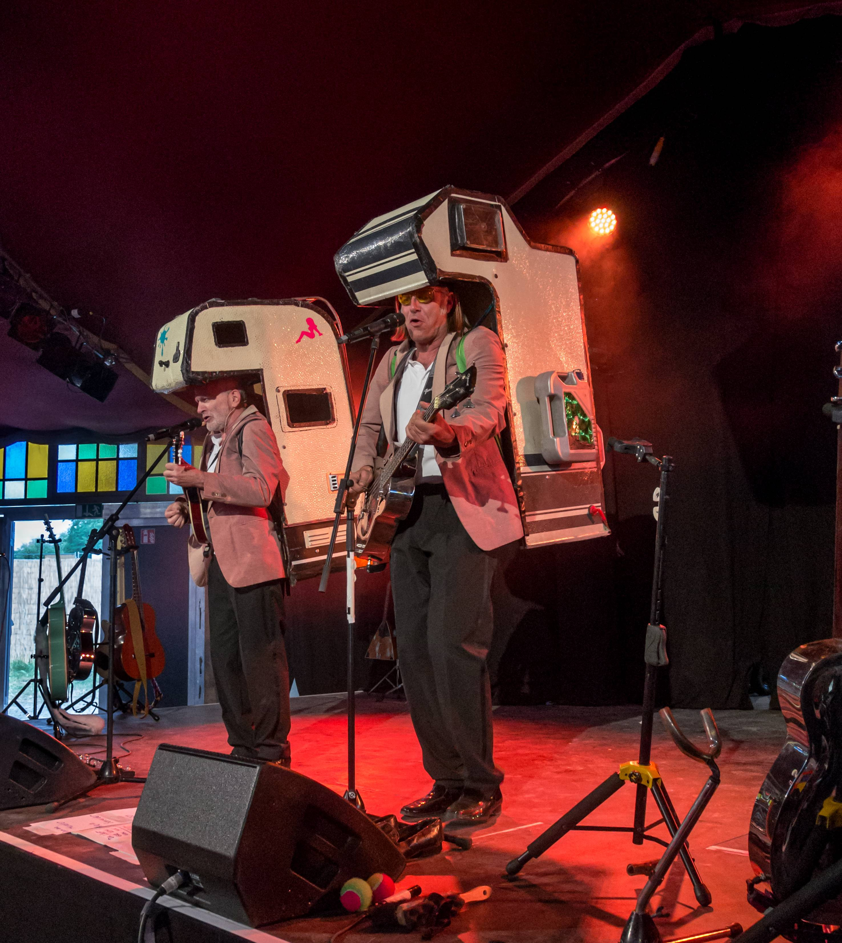 Bilder vom ZMF 2015 Die kleine Tierschau